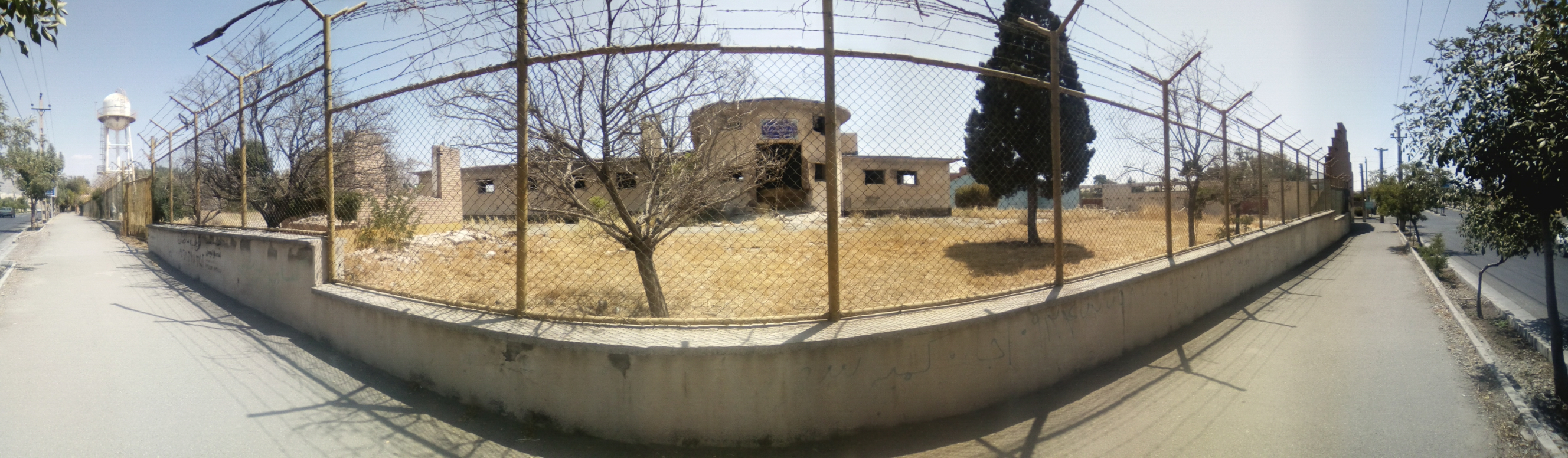 قدیمی ترین کارخانه لوله سازی ایران